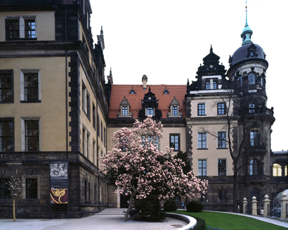 Residenzschloss Dresden Eingang Sophienstraße